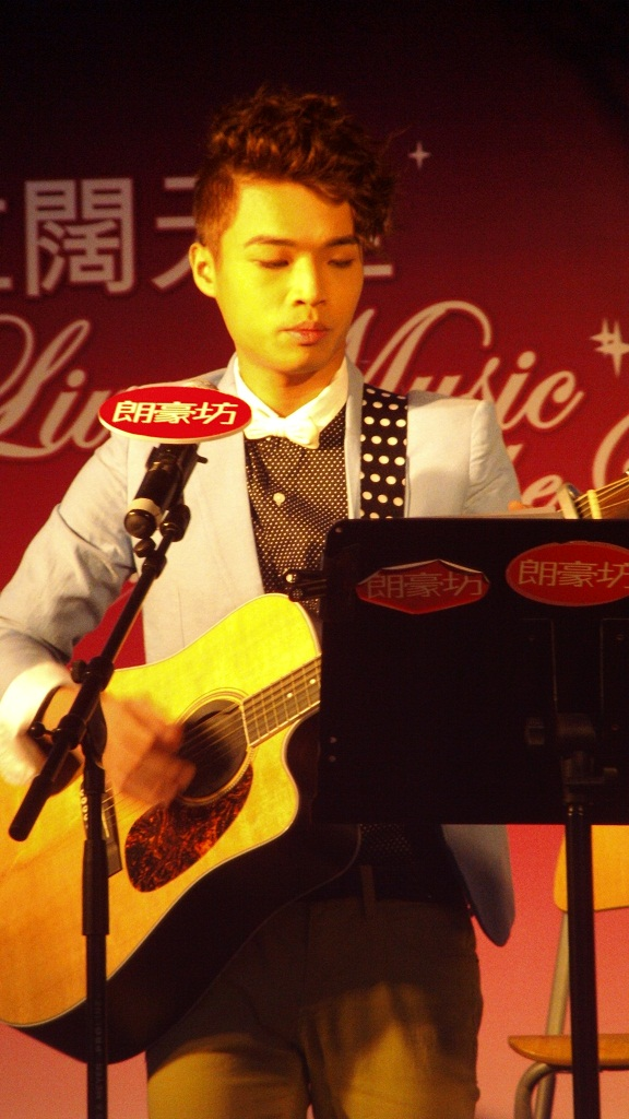 中文（香港）: 彭永琛的樣子